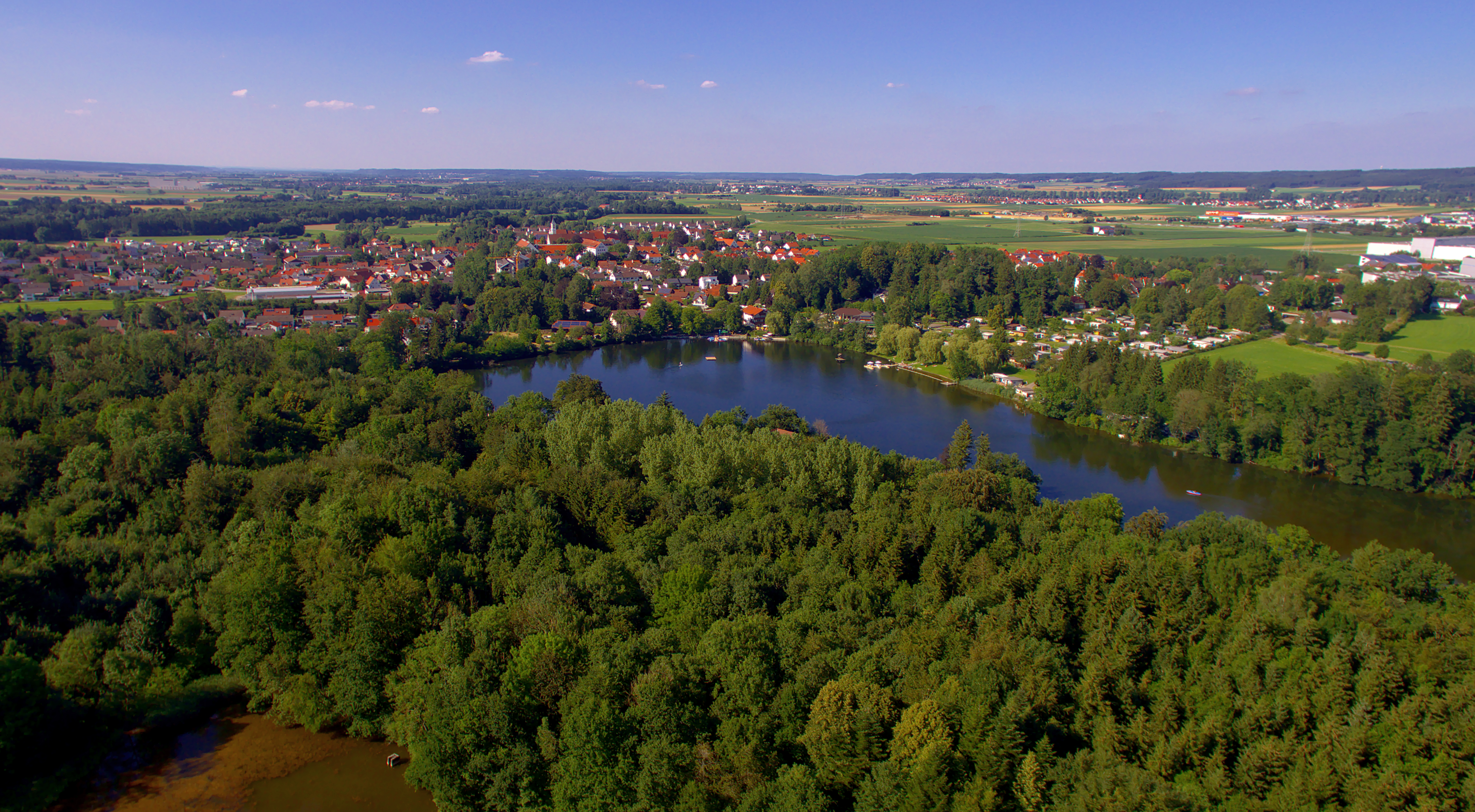 Buxheim (Schwaben) Kartäusersee (auch großer Weiher oder 1. Weiher genannt)